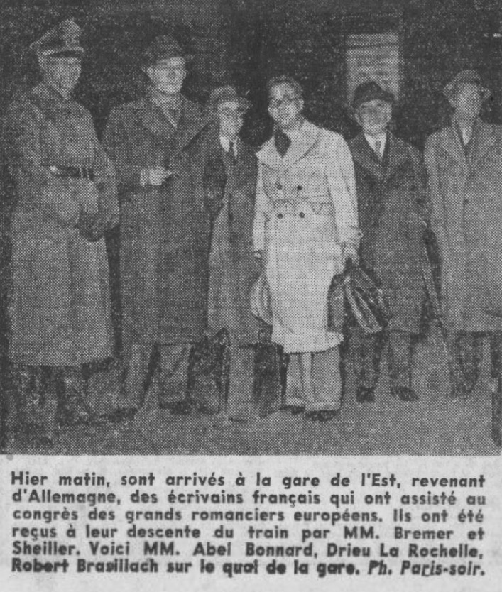 Retour d'écrivains français de voyage en Allemagne, gare de l'Est, Paris, photographie parue dans le quotidien "Paris-Soir" le 3 novembre 1941.